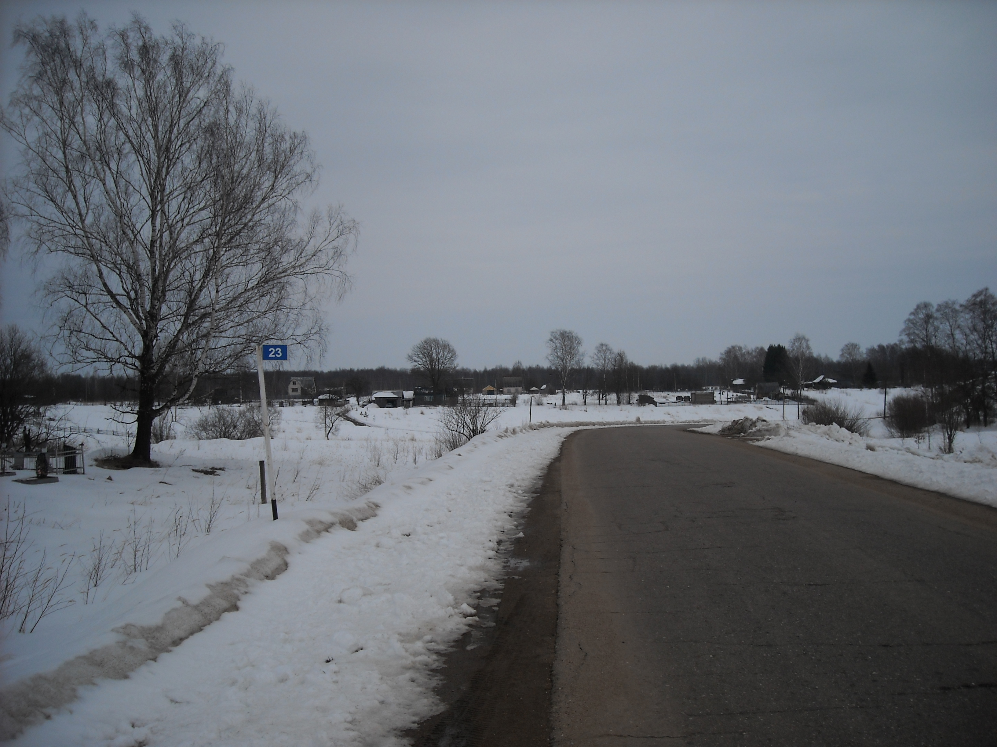 Filippovo village Safonovo district